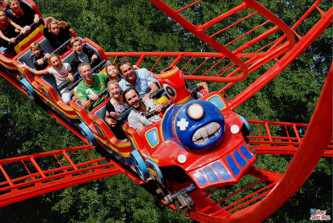 Super Coaster Parc Saint Paul